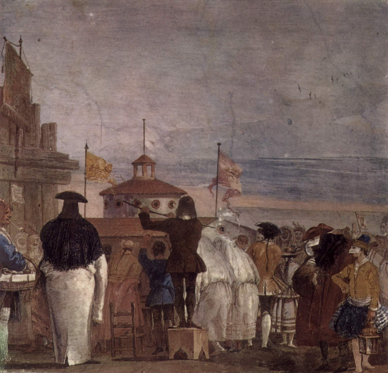 Fresken in der Villa Vallmarana, Vicenca